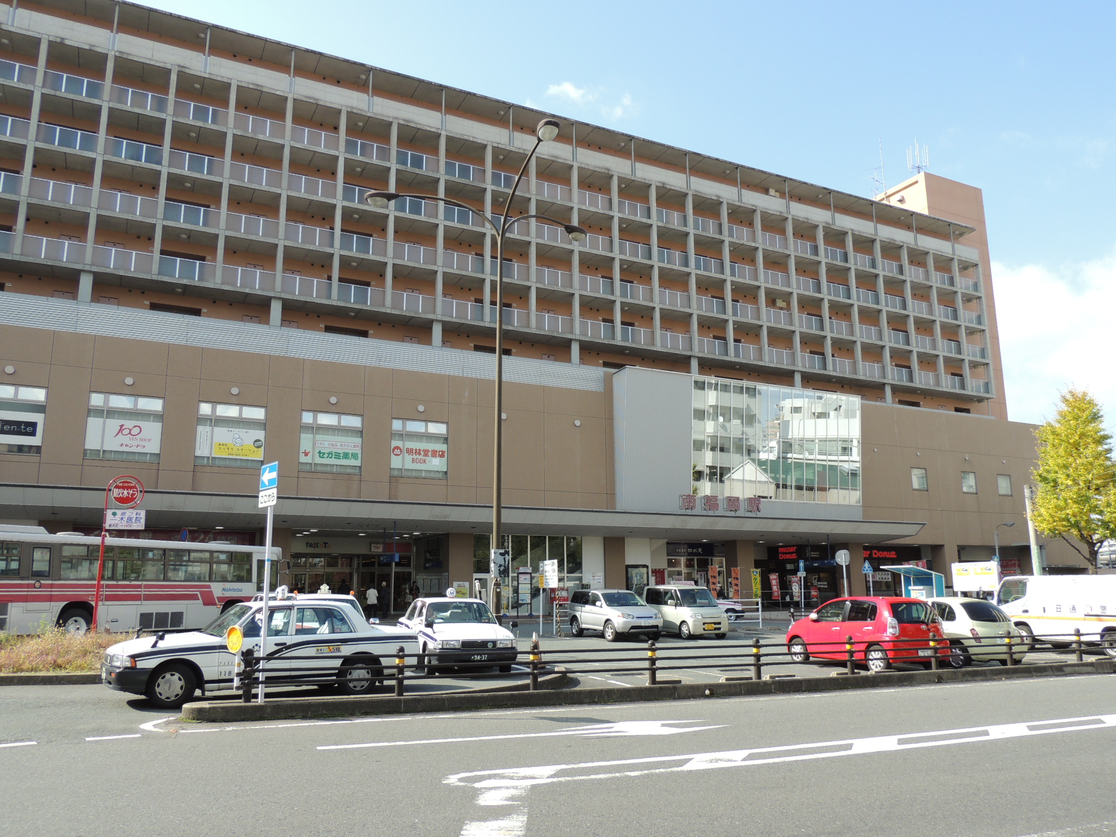 JR鹿児島本線南福岡駅前。